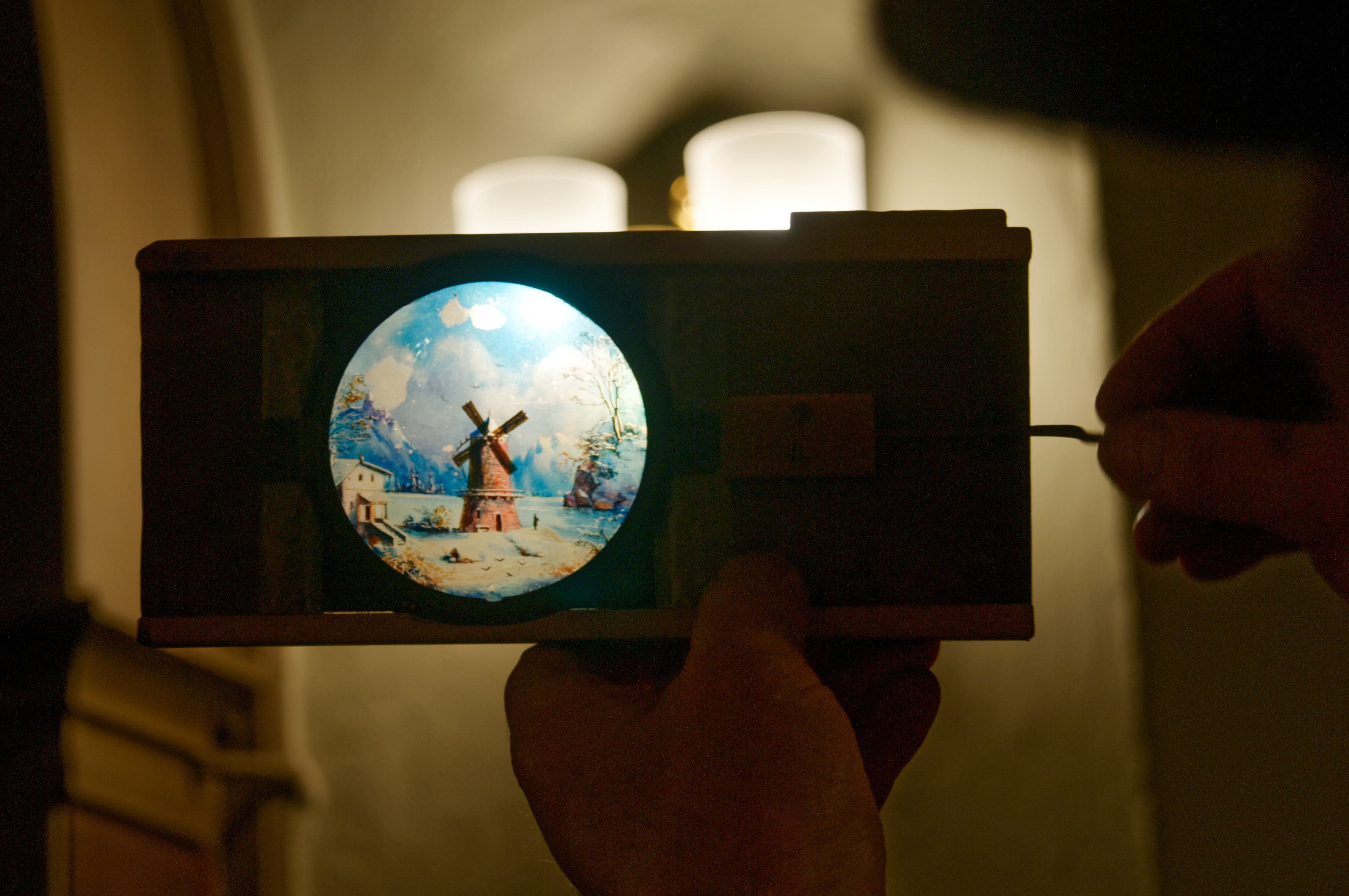 Sauerlandstammtisch Neuenrade. Laterna Magica, Bild mit beweglichen Mühlenflügeln.